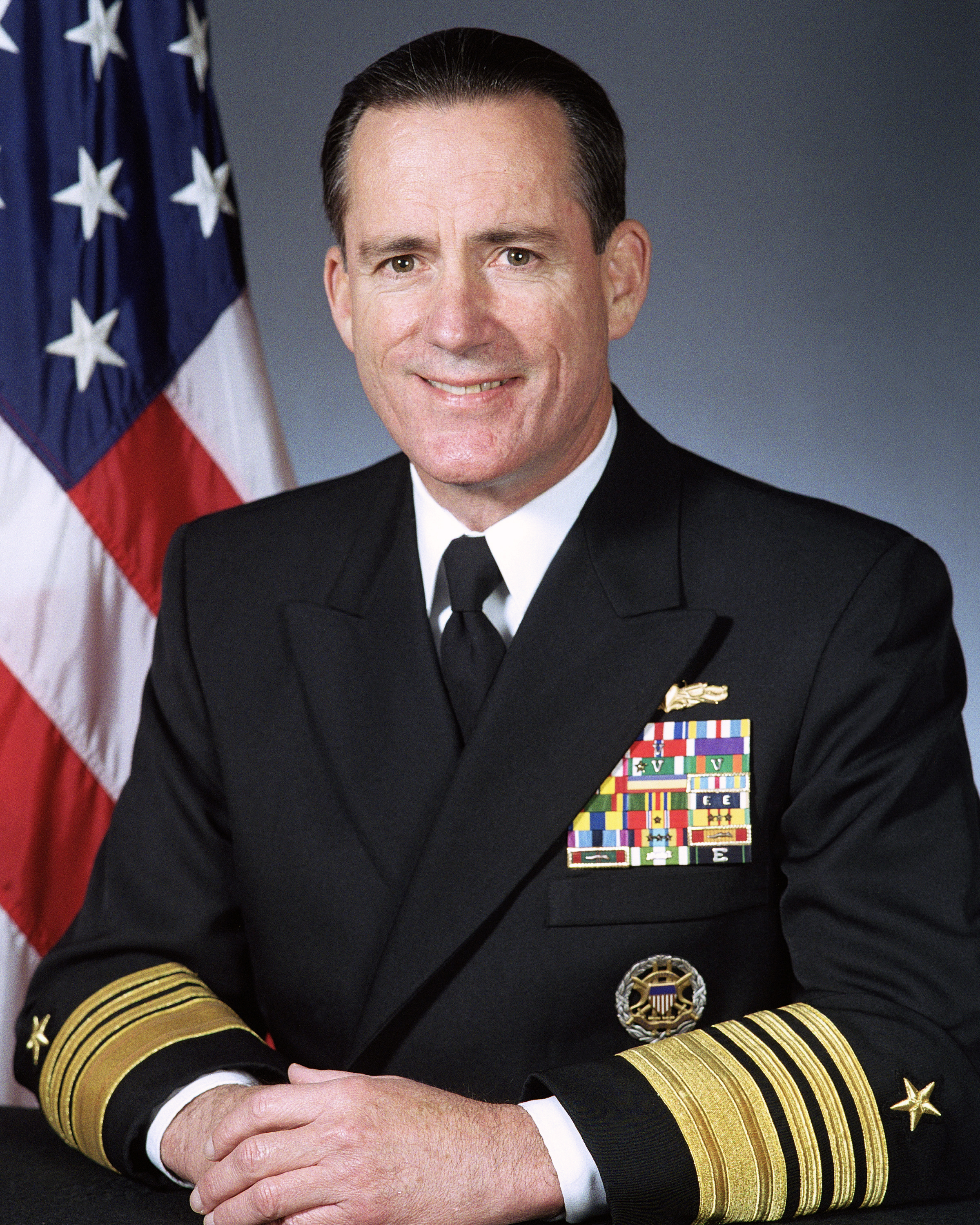 Admiral Robert J. Natter